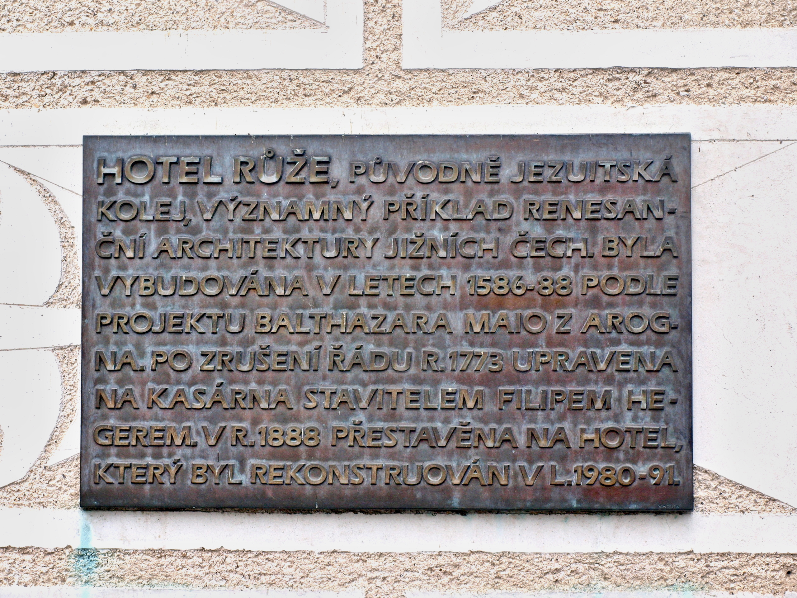 Někdejší jezuitská kolej, dnes Hotel Růže v Horní ulici 154, Český Krumlov